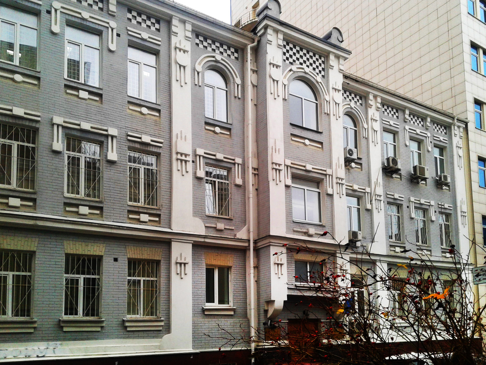 Печерський районний суд міста Києва. Хрестовий провулок, 4. Хрести (Київ).